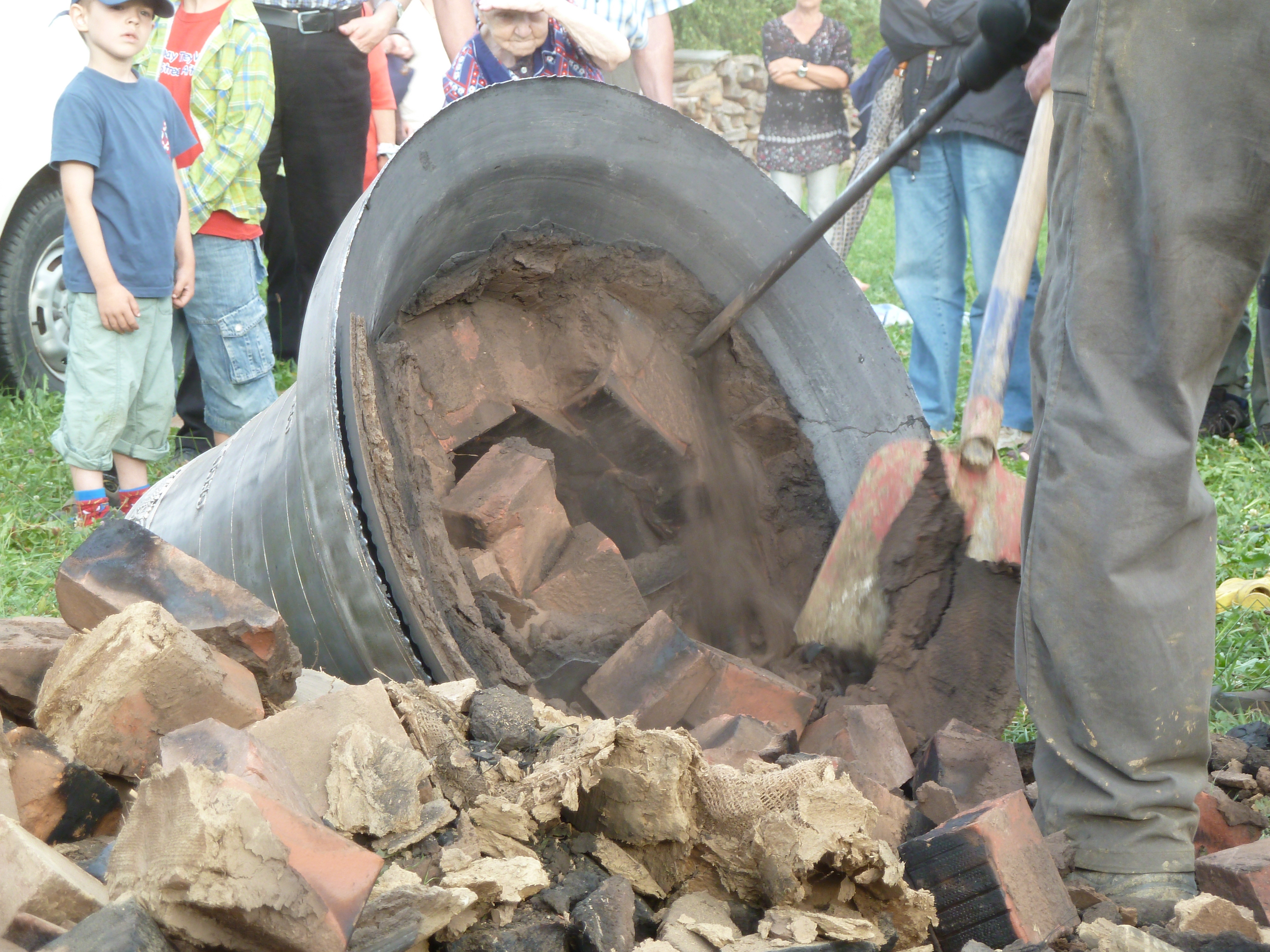 Glockenguss in Ewattingen mit Bruder Michael Reuter von der Abtei Maria Laach